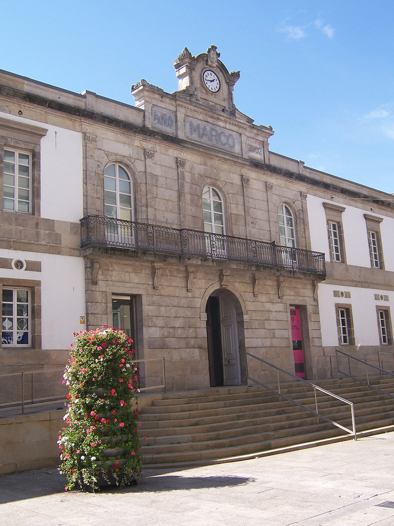 Entrada al museo MARCO de Vigo.